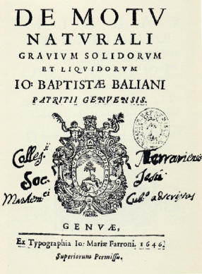 Frontespizio opera di Giovanni Battista Baliani